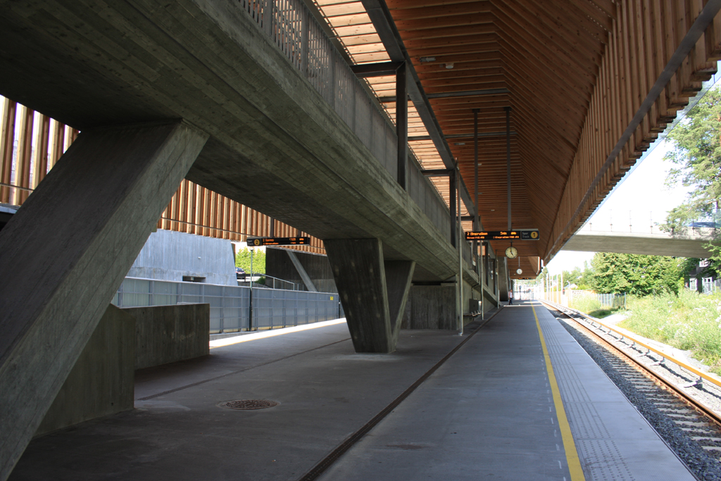 Nye Bekkestua T-banestasjon der både spor 1 og 2 synes. I nord-østgående retning mot Ringstabekk stasjon